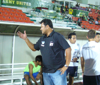 Worrawoot Srimaka